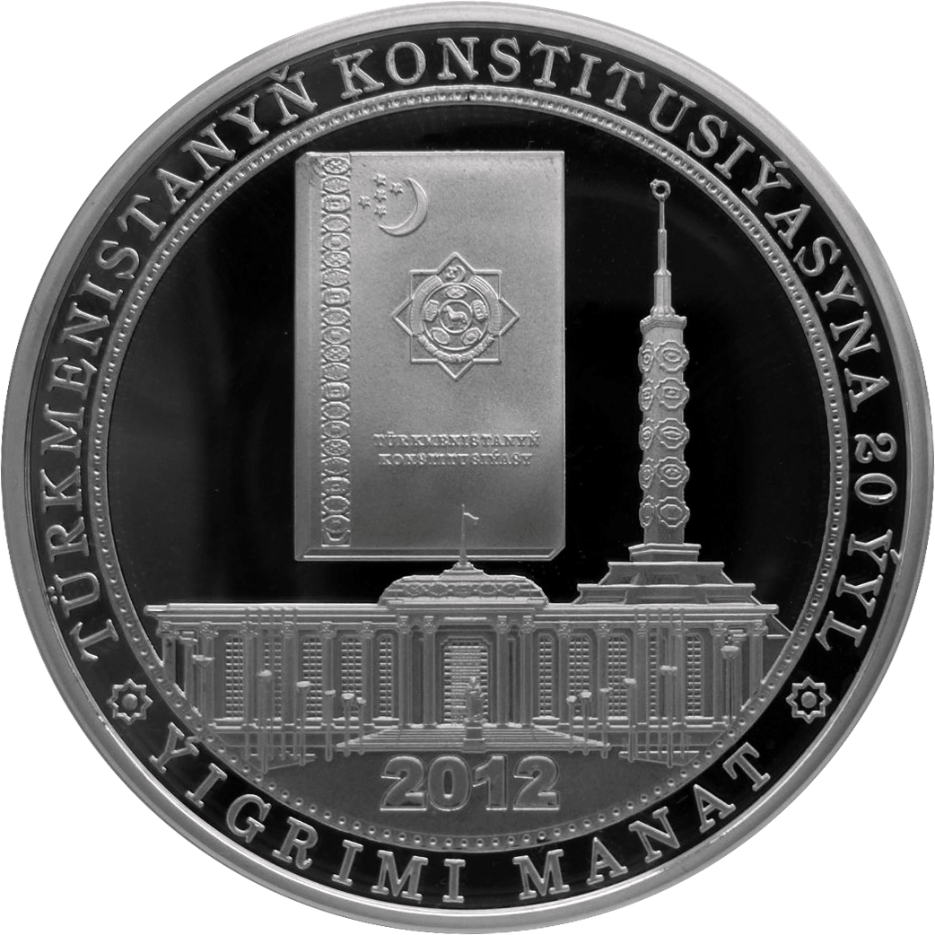 Памятная монета Туркменистана